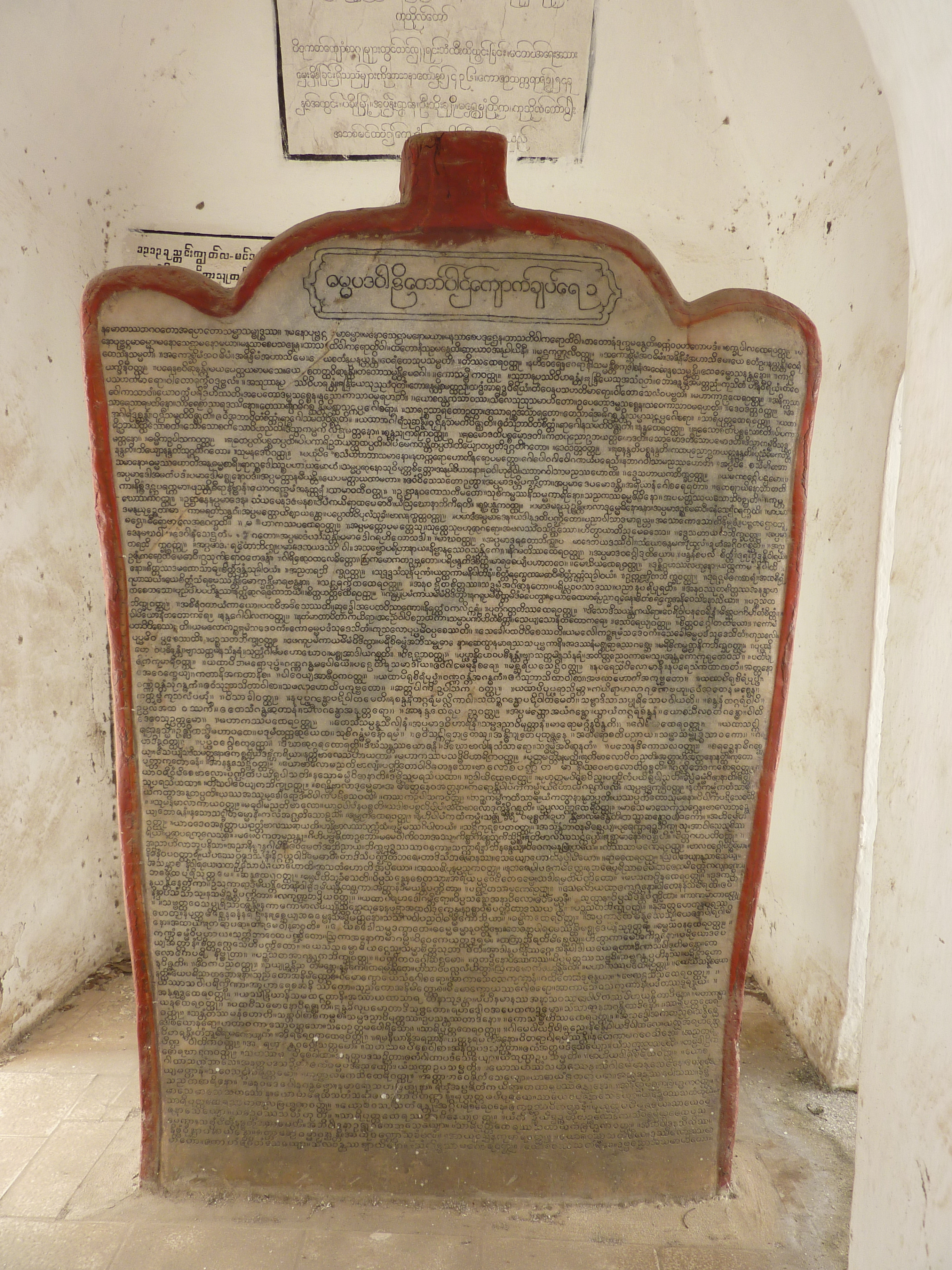 10 Dhammapada Page 1, Kuthodaw at Mandalay